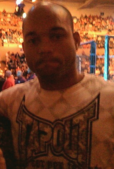 Drew at UFC Diaz vs Neer in Omaha